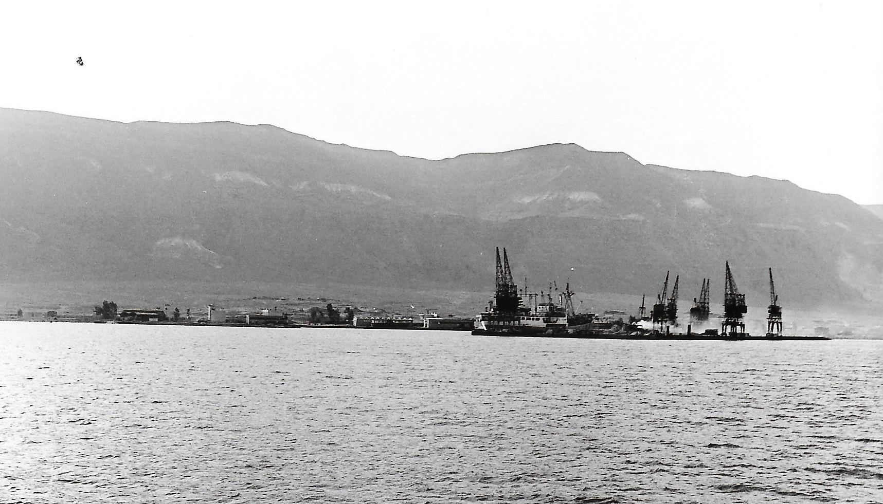 נמל עדביה כפי שנראה לראשונה מספינות חיל הים המתקרבות אליו אוקטובר 1973